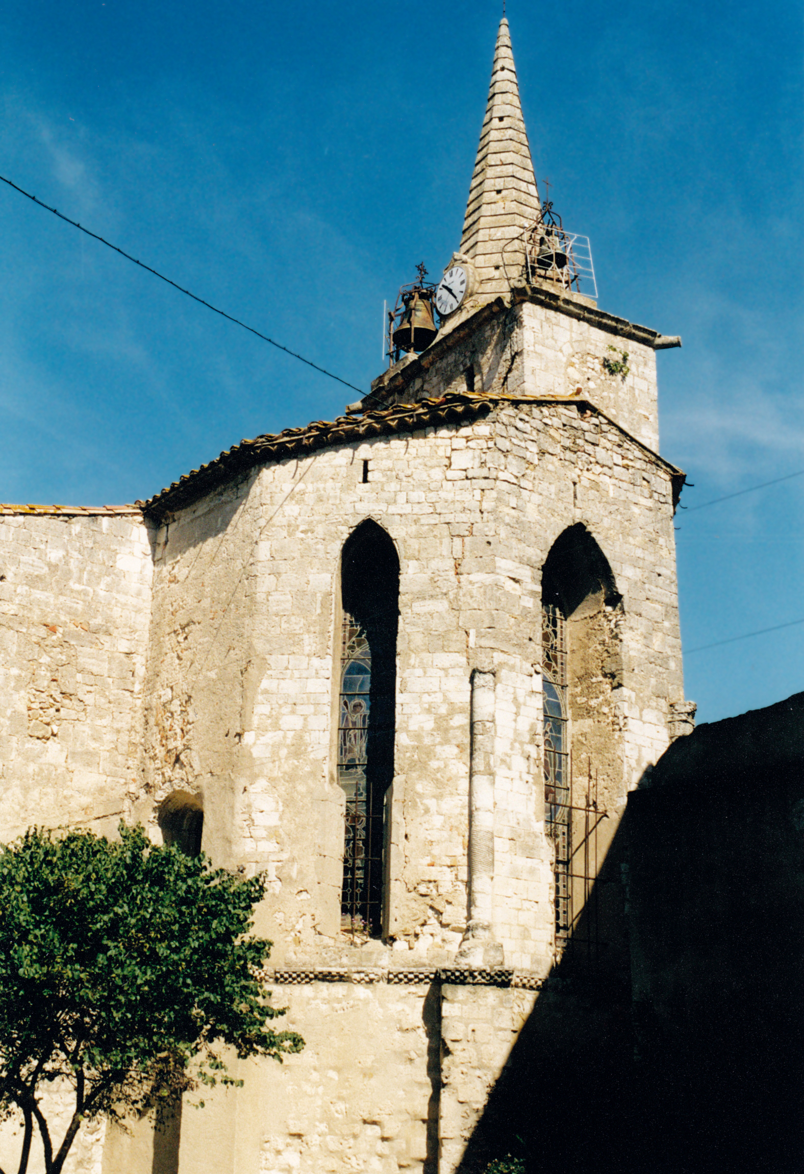 France - Languedoc - Aude - Église Saint-Martin de Fleury d'Aude